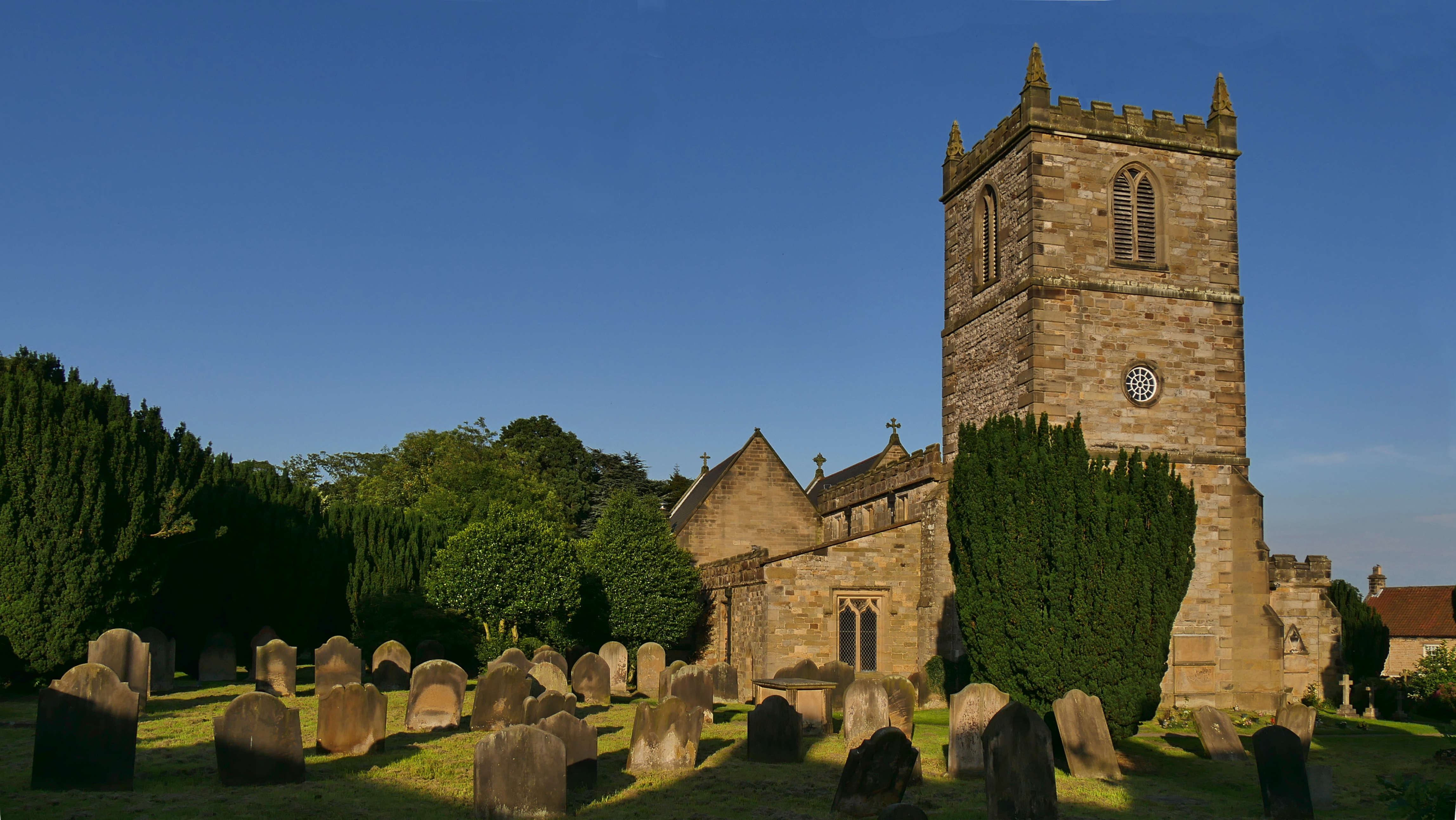 All Saints church, Kirkbymoorside graveyard tower and church